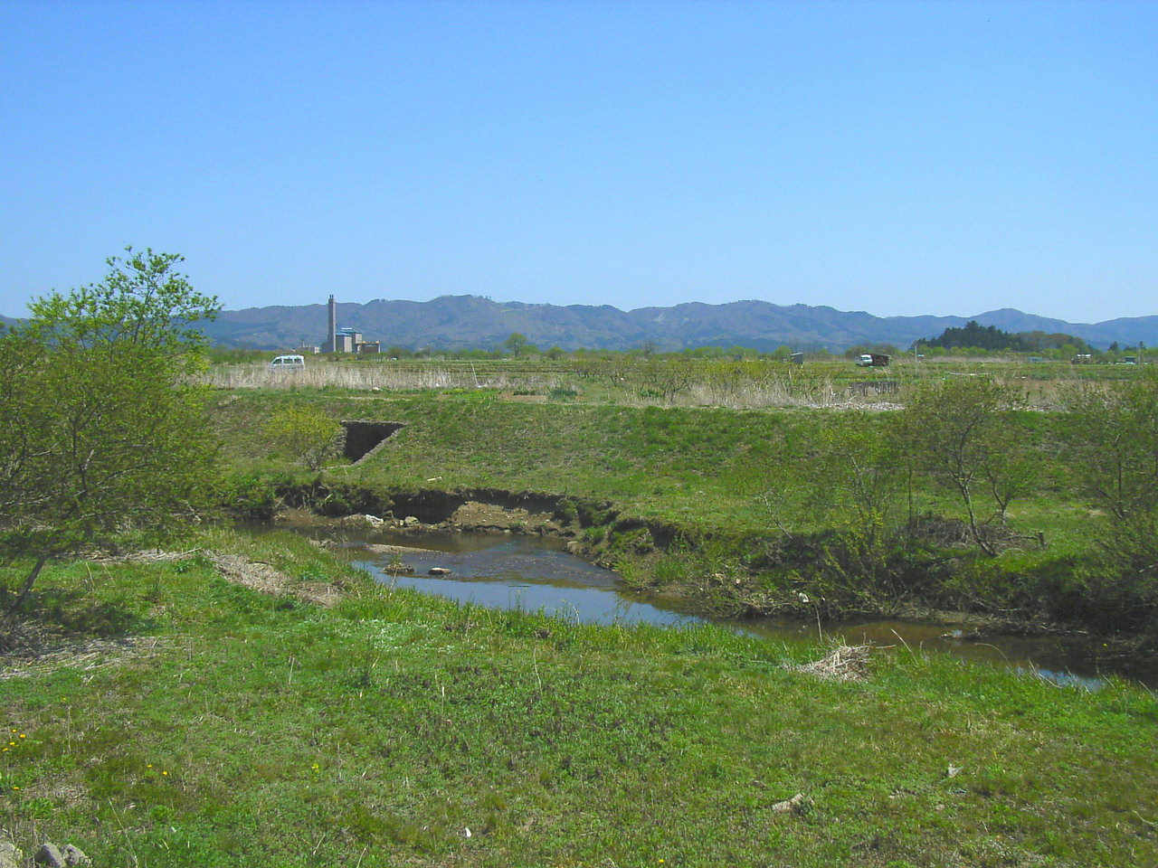 Oda River. Kakuda, Miyagi prefecture, Japan.